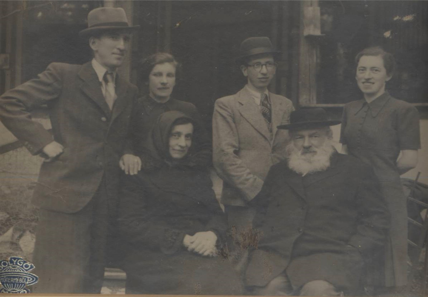 משפחה מקהילת טעטש